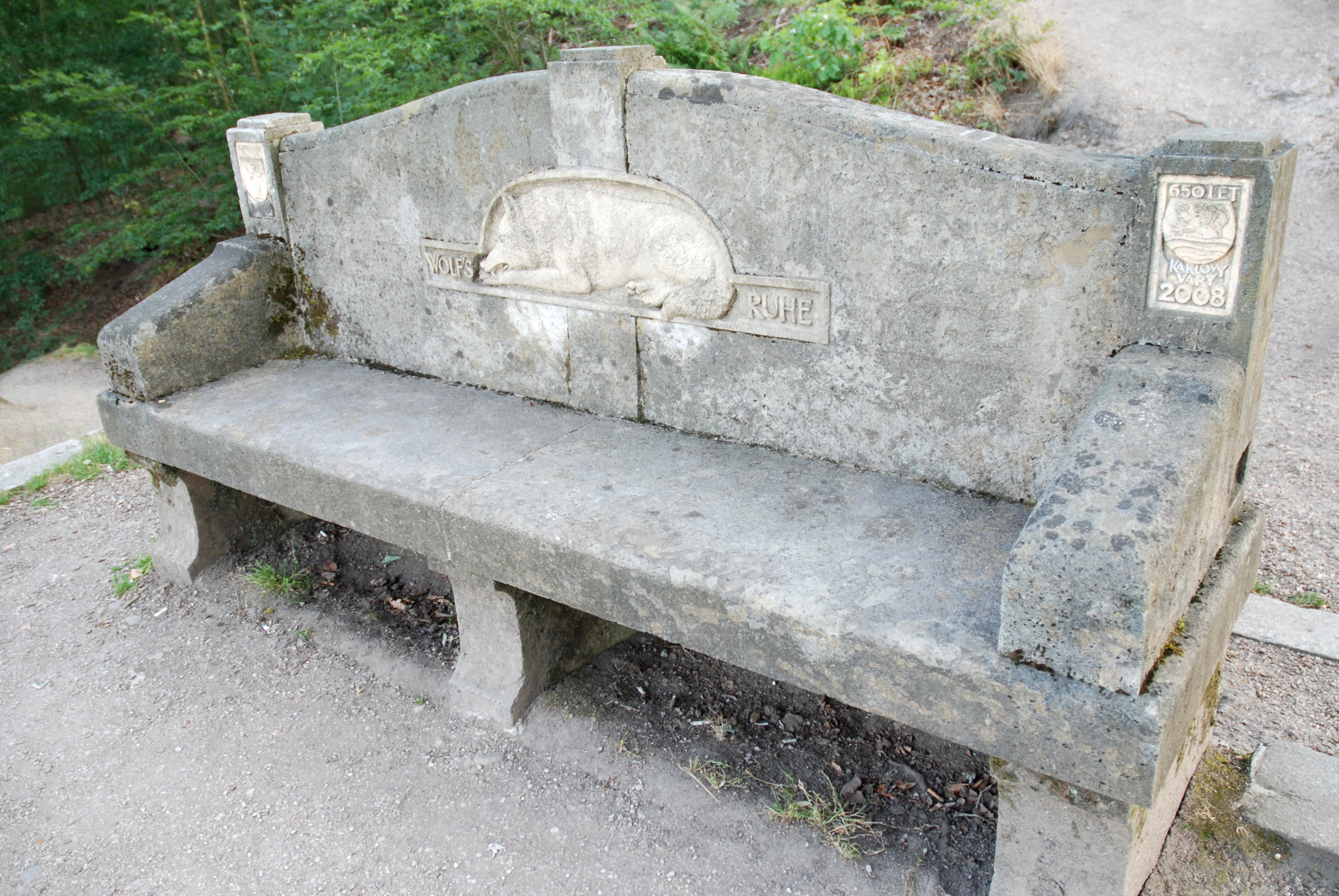 Kamenná lavička s reliéfem spícího vlka v karlovarských lázeňských lesích